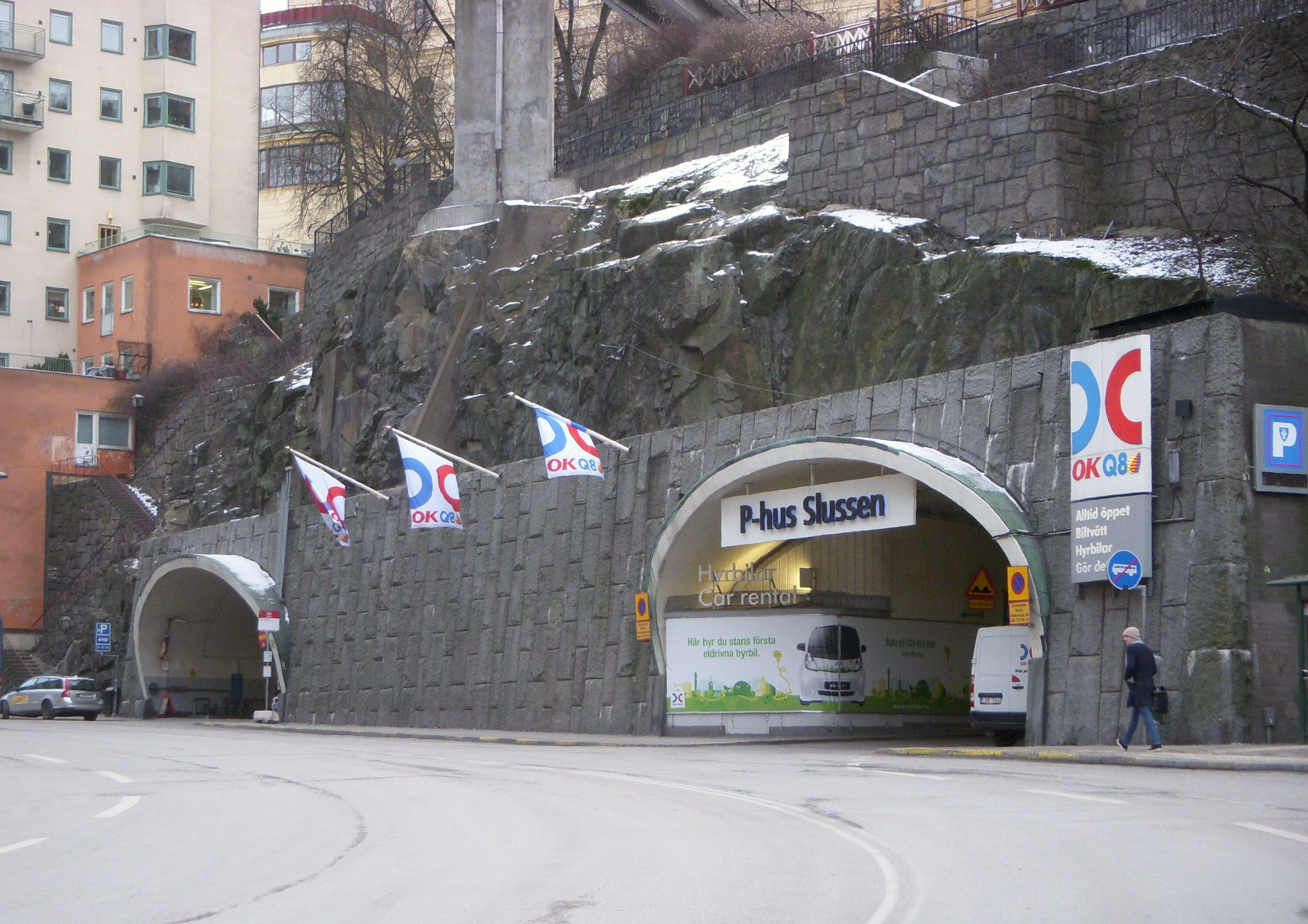 P-hus Slussen, infart till Katarinabergets skyddsrum från Katarinavägen